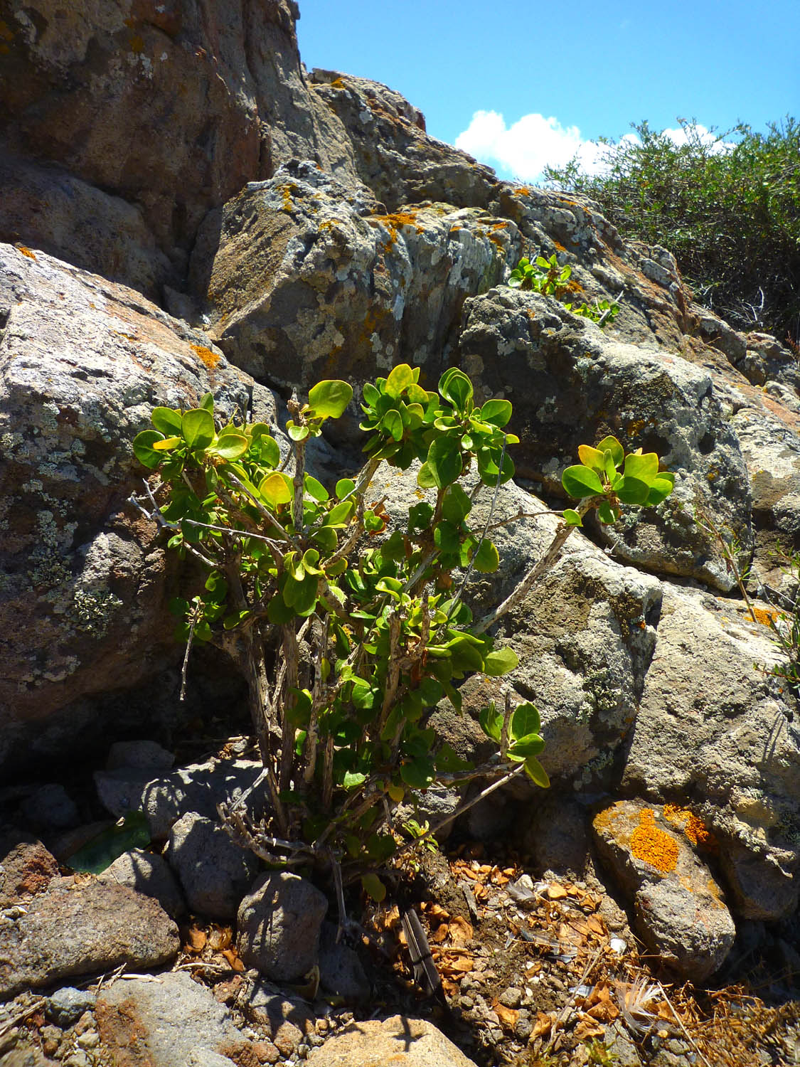 Withania frutescens en la Isla del Ciervo en Cartagena (España)